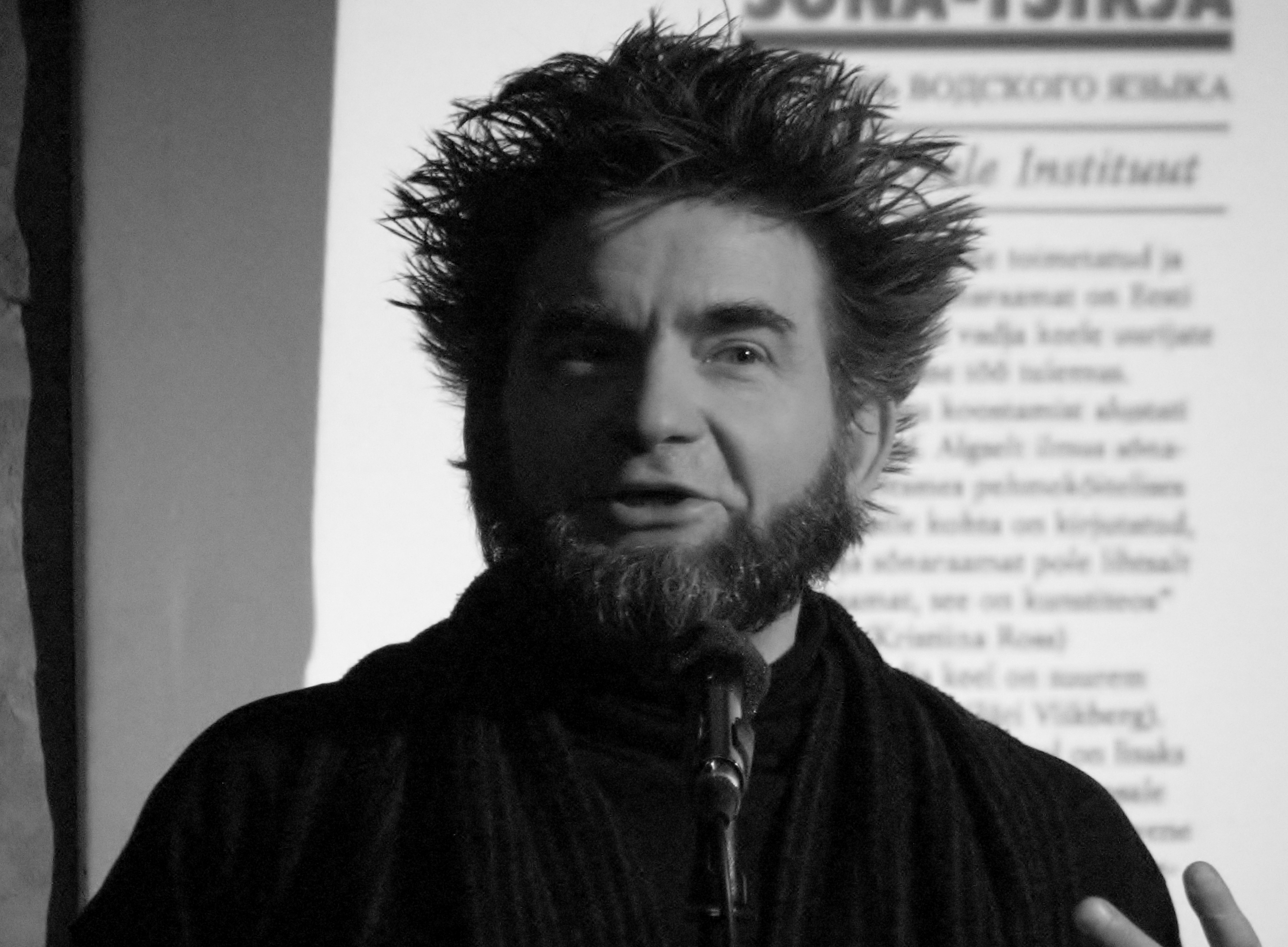 Jaak Johanson esinemas Vadja keele sõnaraamatu esitlusel Kloostri aidas